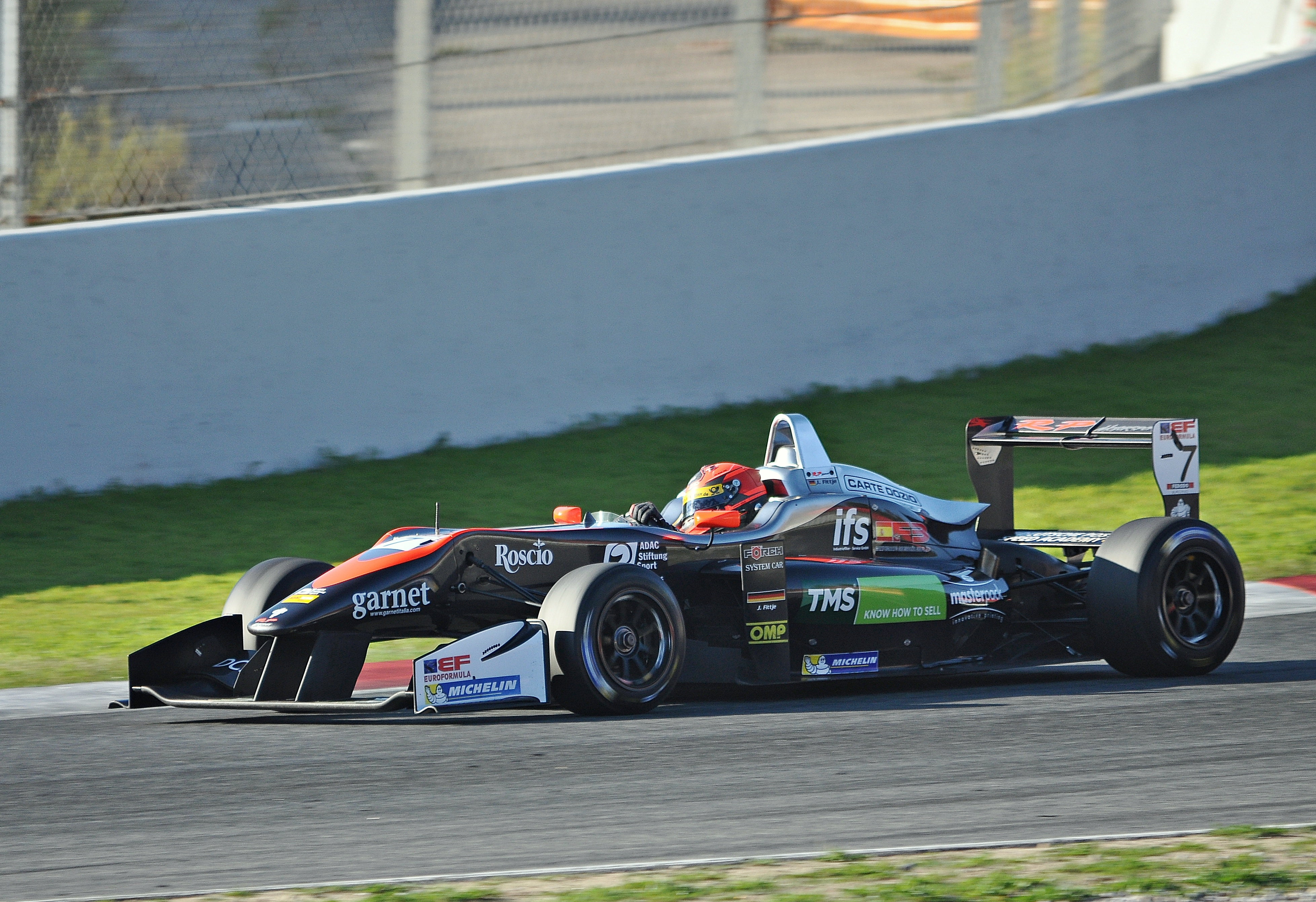 Circuito de Barcelona 2017